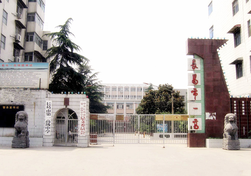 长葛一高北大门